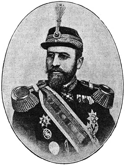 Сербский генерал Сава Груич. Это изо было использовано в статье «Груич, Савва Дмитриевич» опубликованной в восьмом томе «Военной энциклопедии», который был издан книгоиздательским товариществом И. Д. Сытина в 1912 году в столице Российской империи городе Санкт-Петербурге.